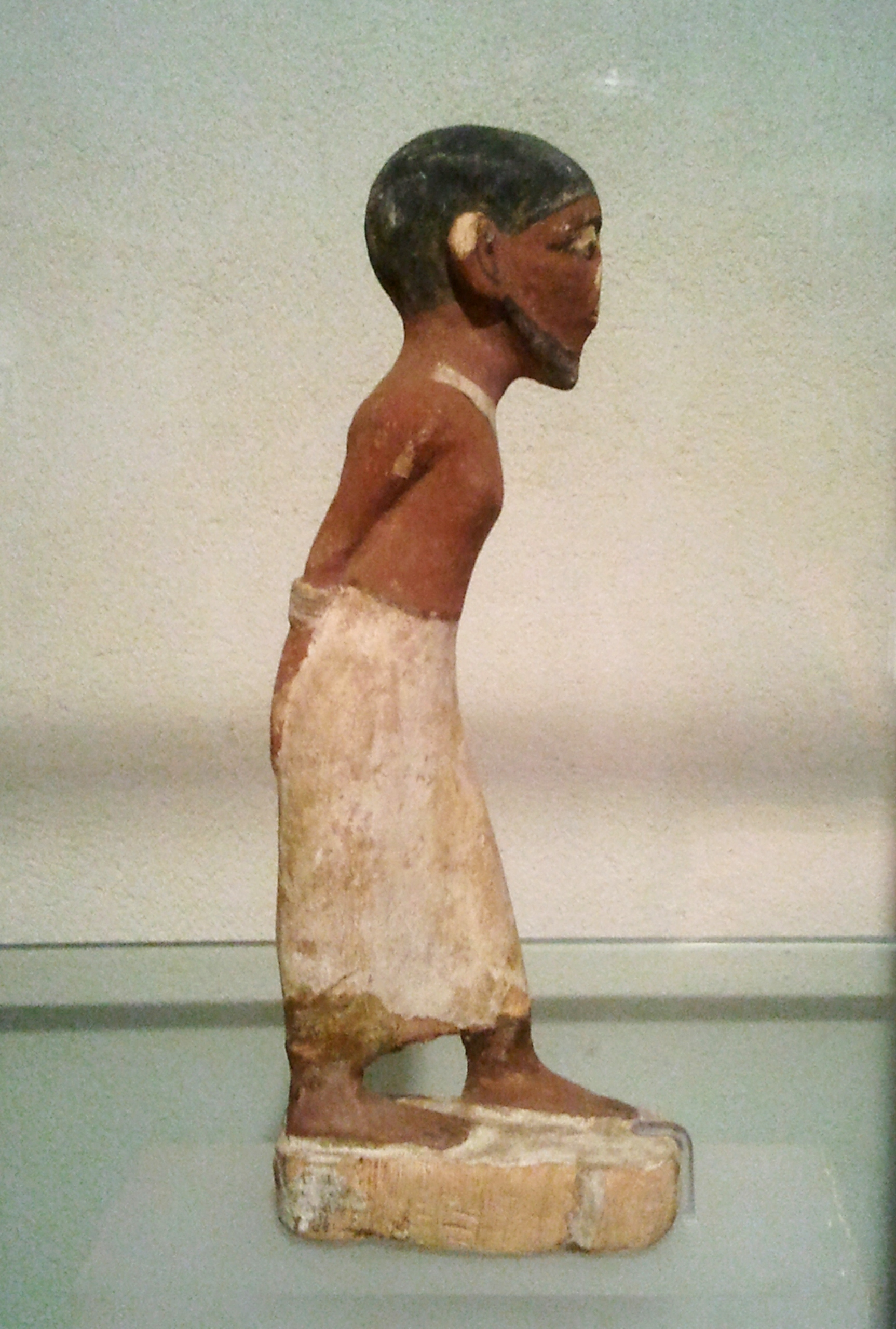 צלמית של שבוי שמי, ידיו קשורות מאחור, ממצרים העתיקה. אסף מוזיאון הכט